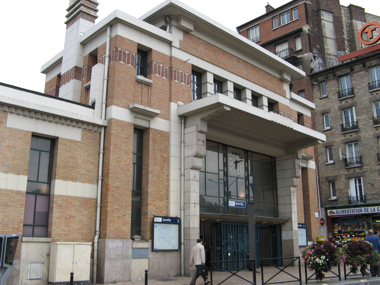 Gare de Gentilly vue de l'extérieur, RER B, France